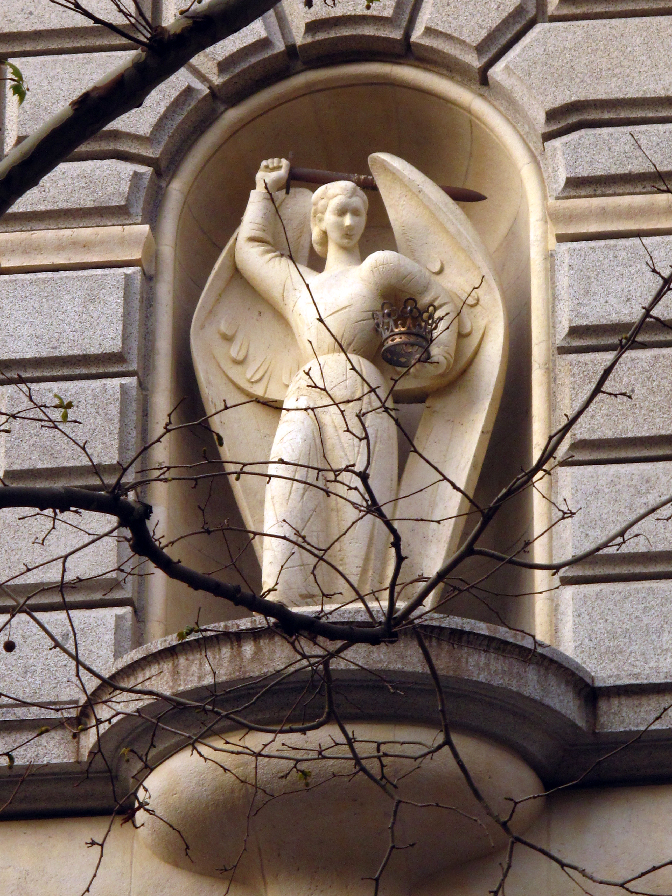 Àngel (Àngel Ferrant). Portal de l'Àngel (Barcelona)